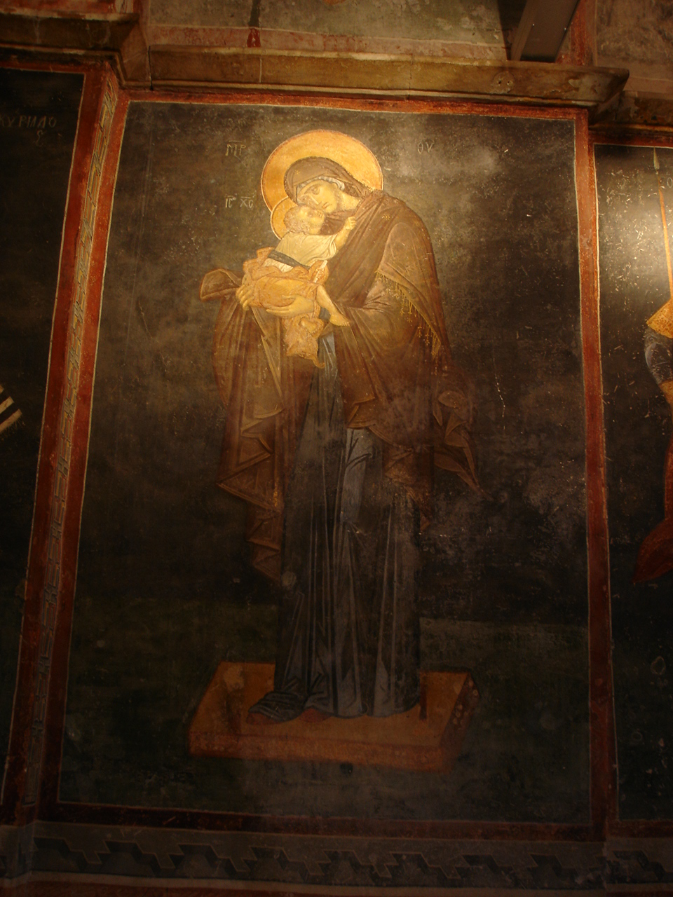 Istanbul: Museo di San Salvatore in Chora (Kariye Cami) - Parecclesion (cappella funeraria). Abside, affresco con Madonna e bambino. Foto di: Giovanni Dall'Orto, 29-5-2006.